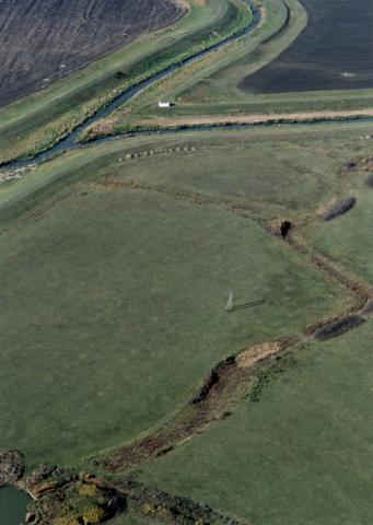 Tarnaörs, Hungary, aerialphotography